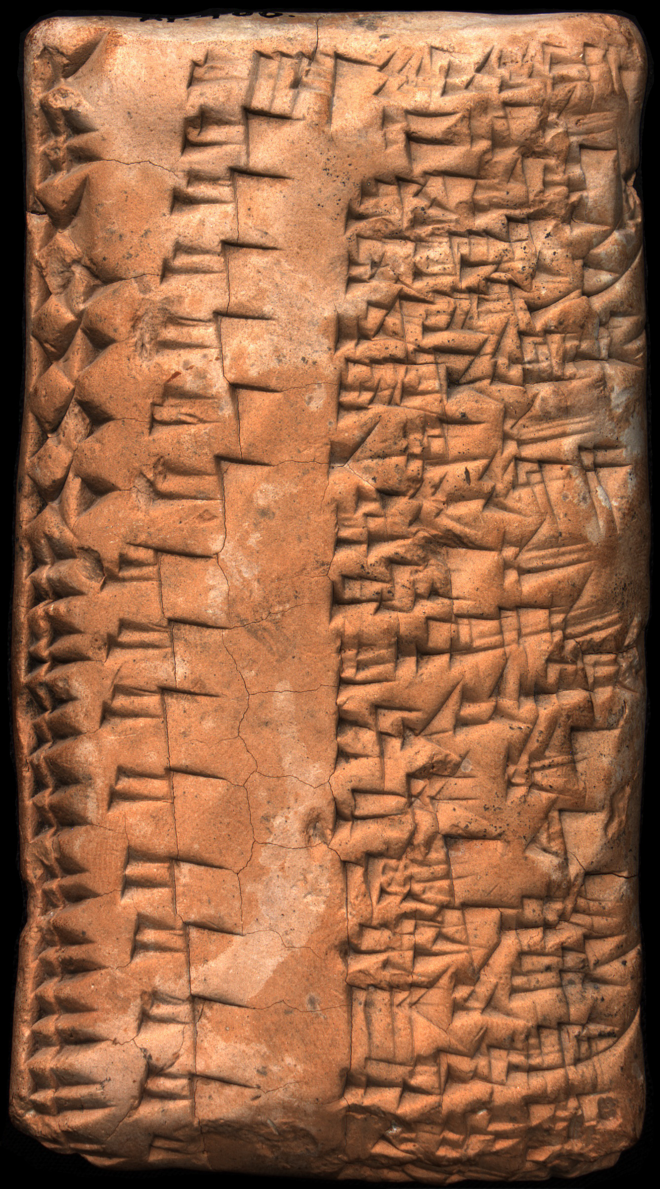 Old Babylonian cuneiform tablet (allotment of fields) kept at the Royal Museums of Art and History in Brussels